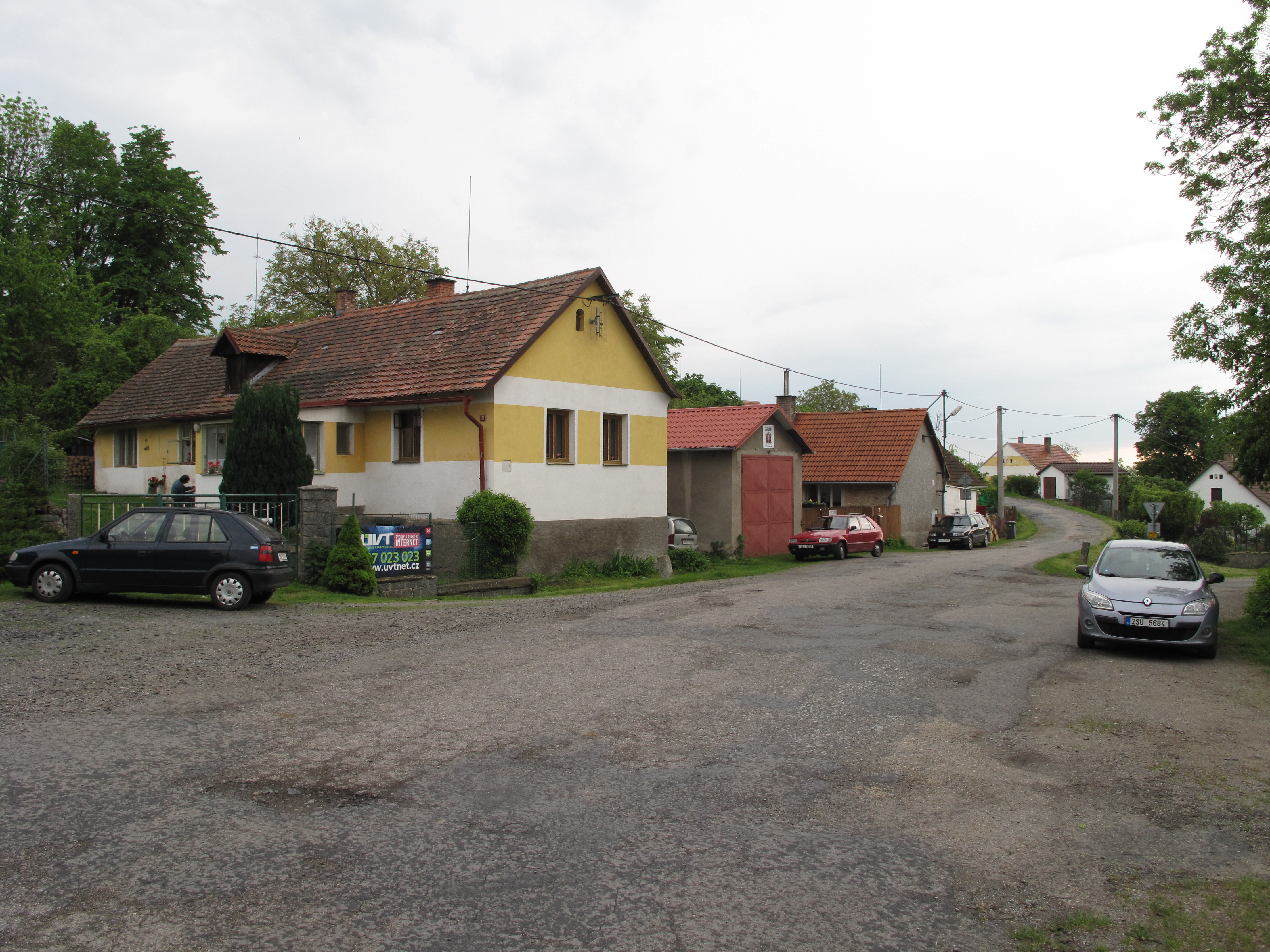 Domy u cesty v Šebáňovicích.